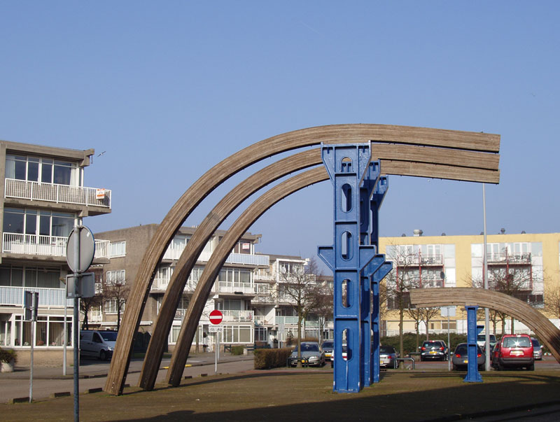 Het Dok met kunstwerk Monument voor de Scheepvaart en woongebouwen